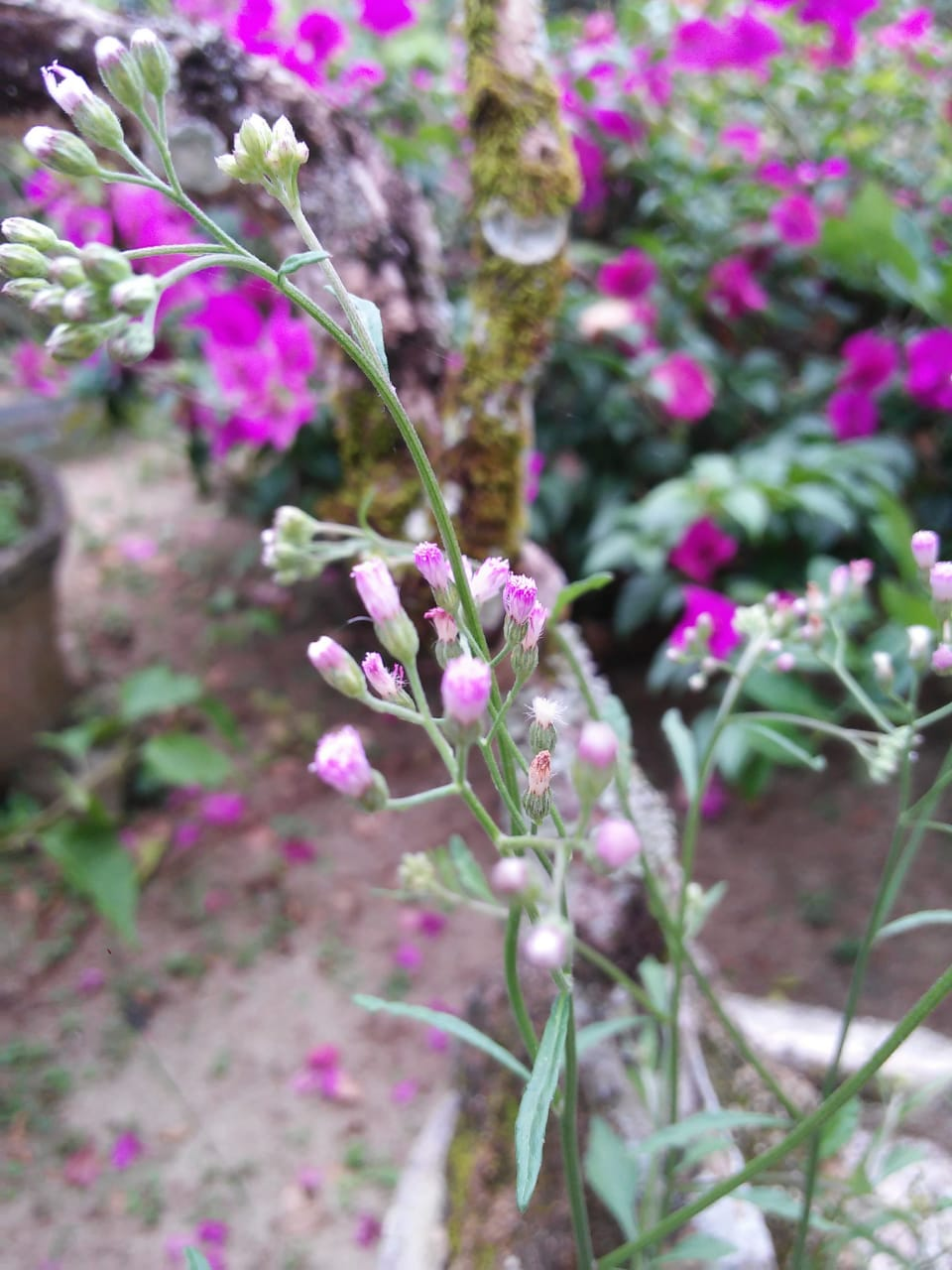 Cyanthillium cinereum